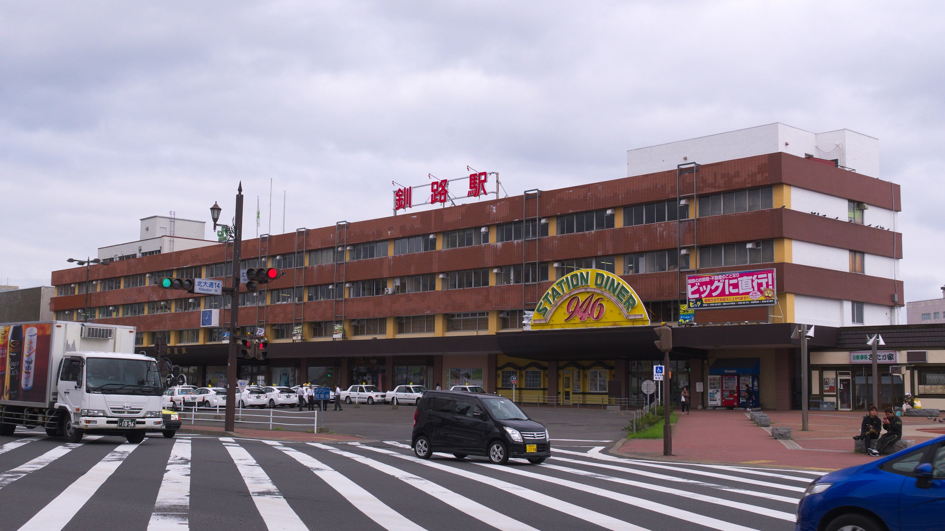 釧路駅 駅舎